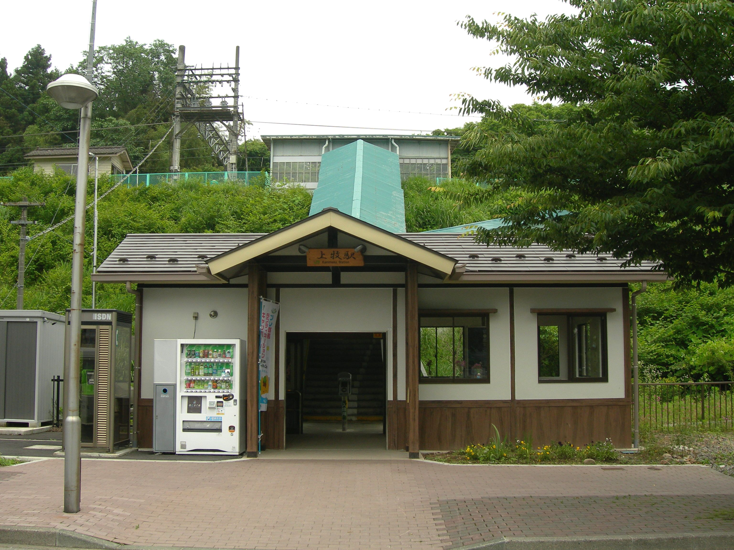 上牧駅(群馬県)